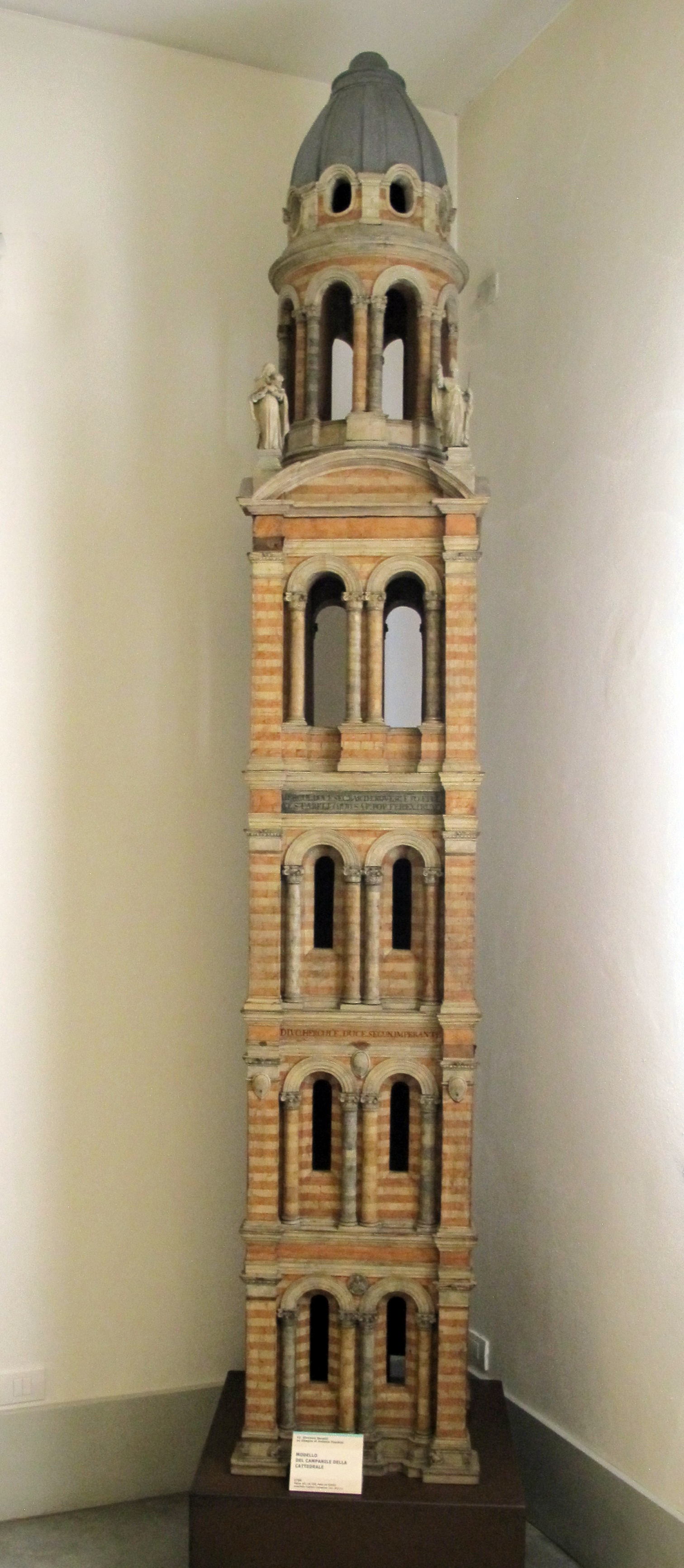 Museo della Cattedrale This is a photo of a monument which is part of cultural heritage of Italy.